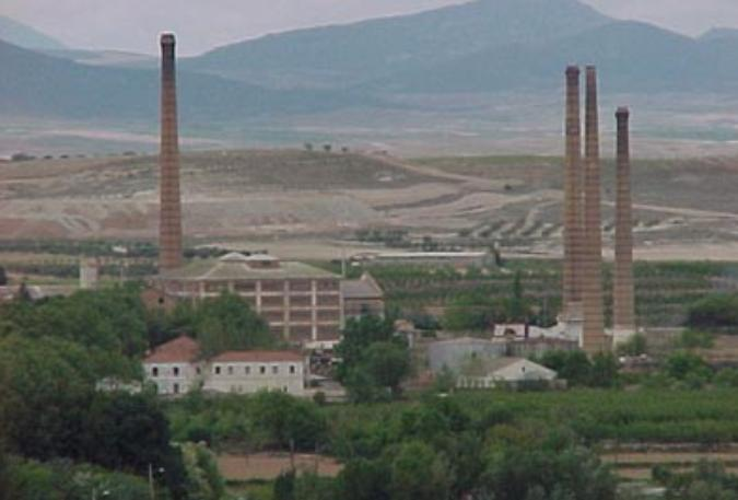 Paisaje desde el mirador de la cruz del castillo.Desde donde se ve la azucadera en el fondo. Ampliada un poco posteriormente.